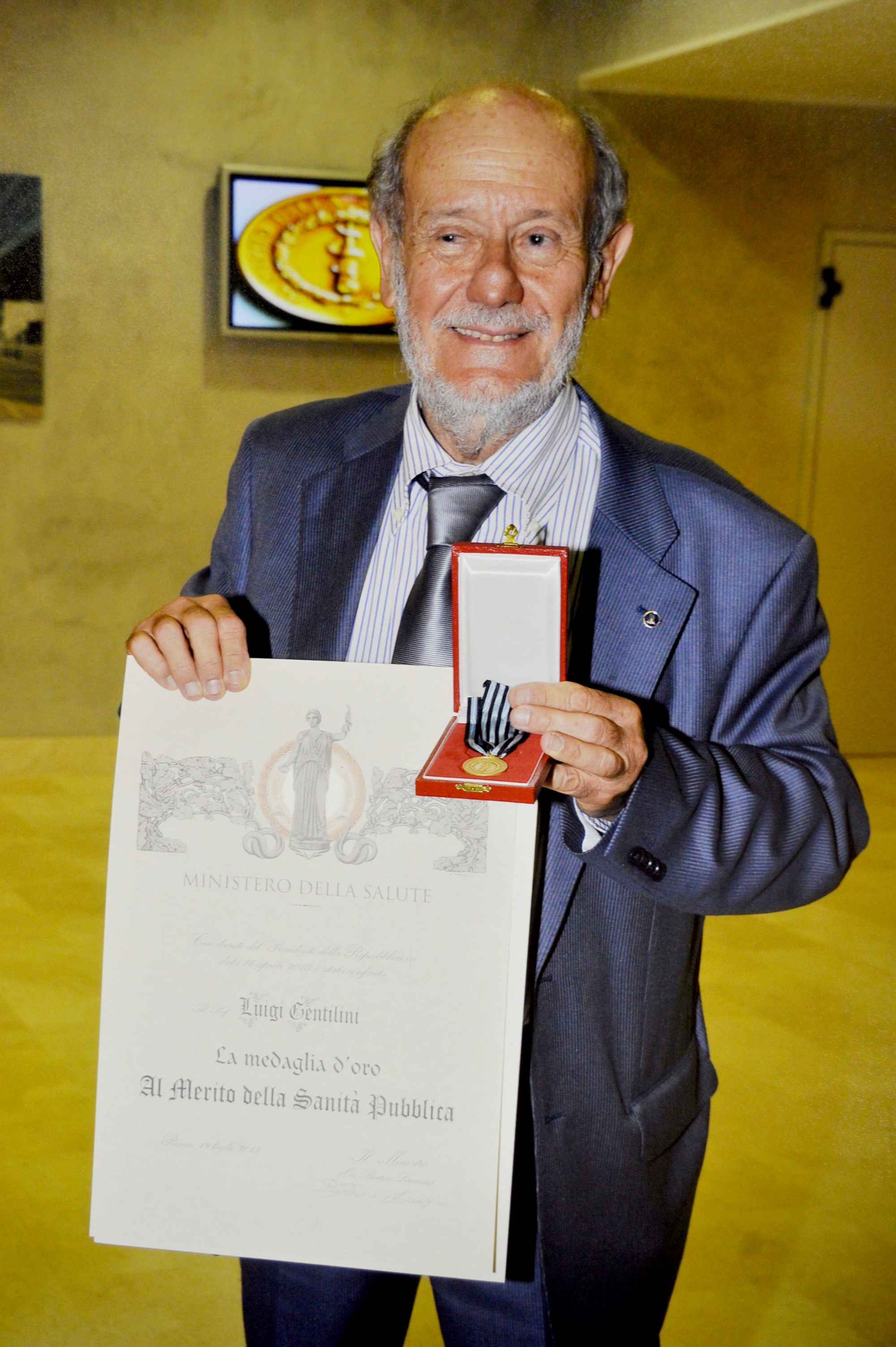 Il professore Luigi Gentilini riceve la Medaglia d'oro al merito della sanità pubblica